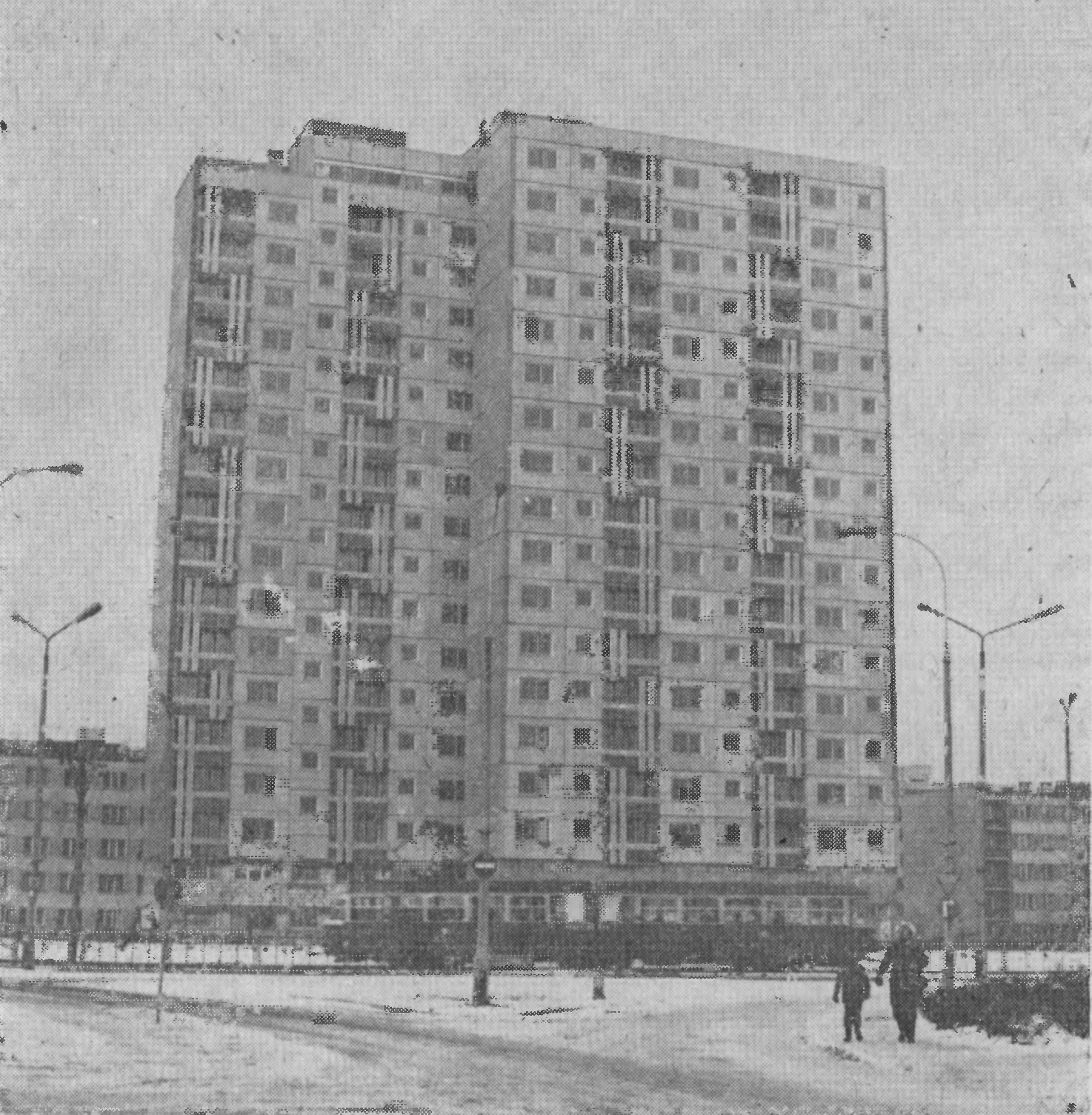 Budynek 16-kond. na os. Piastowskim - styczeń 1977